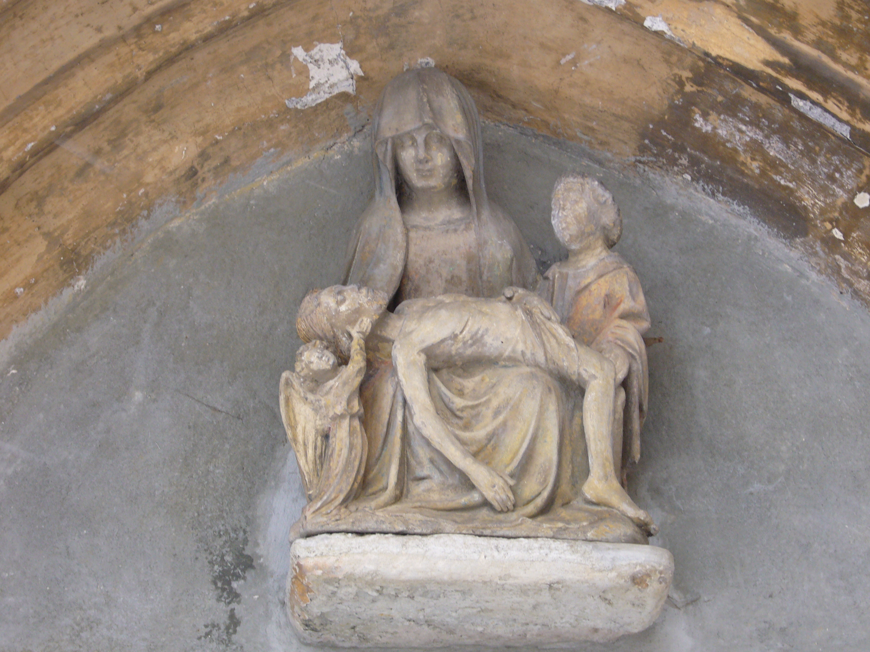 Pietà du XVIème siècle, au-dessus du portail de l'église Saint-Eutrope à Collanges (dép. 63), classée.